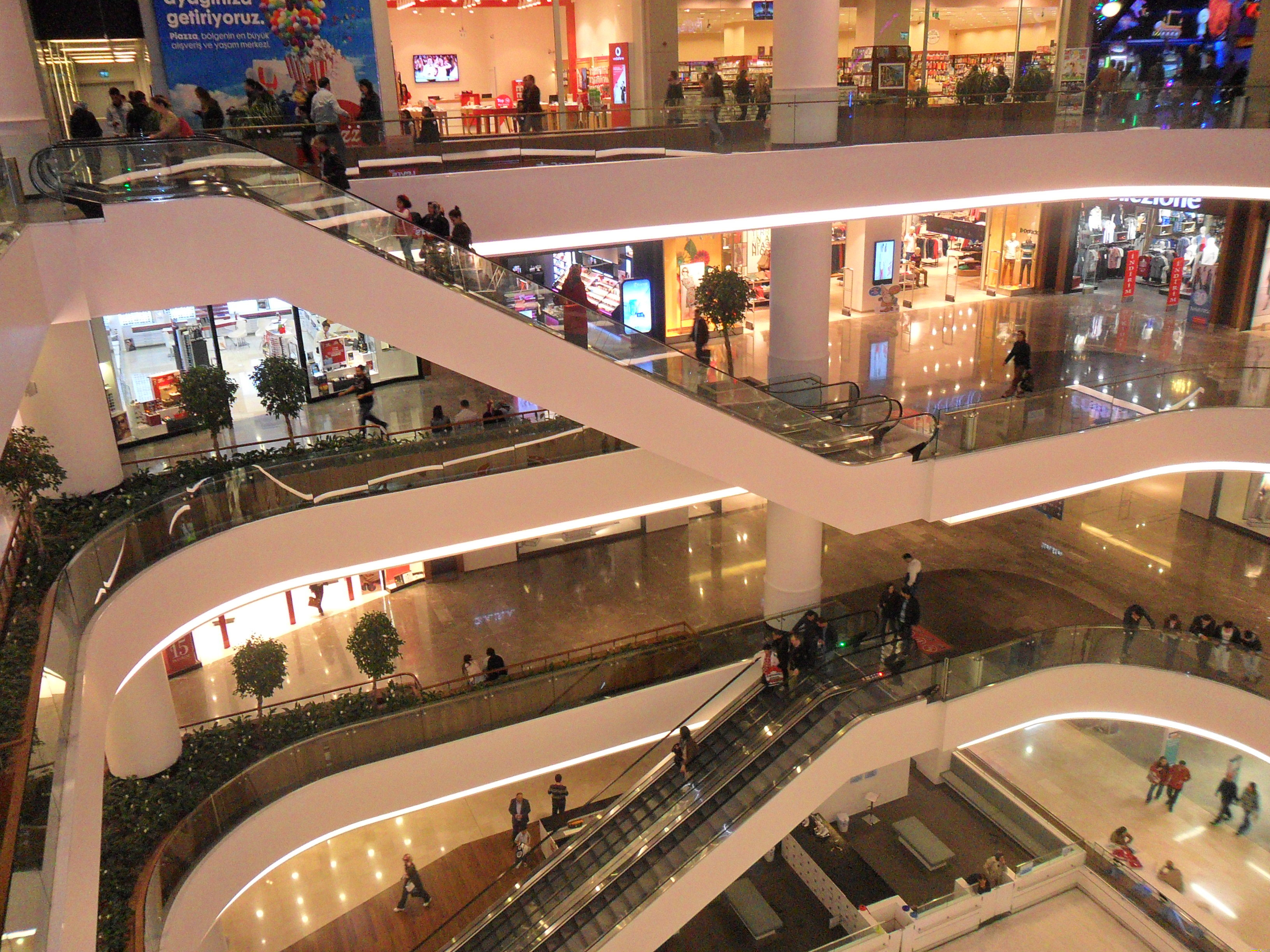 Samsun Piazza AVM'nin en üst katından çekilen bir fotoğraf.